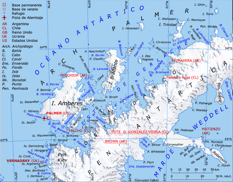 Mapa del sector del estrecho de Gerlache, Antártida. Bases y refugios. Relieve sombreado. Base cartográfica: Antarctic Digital Database